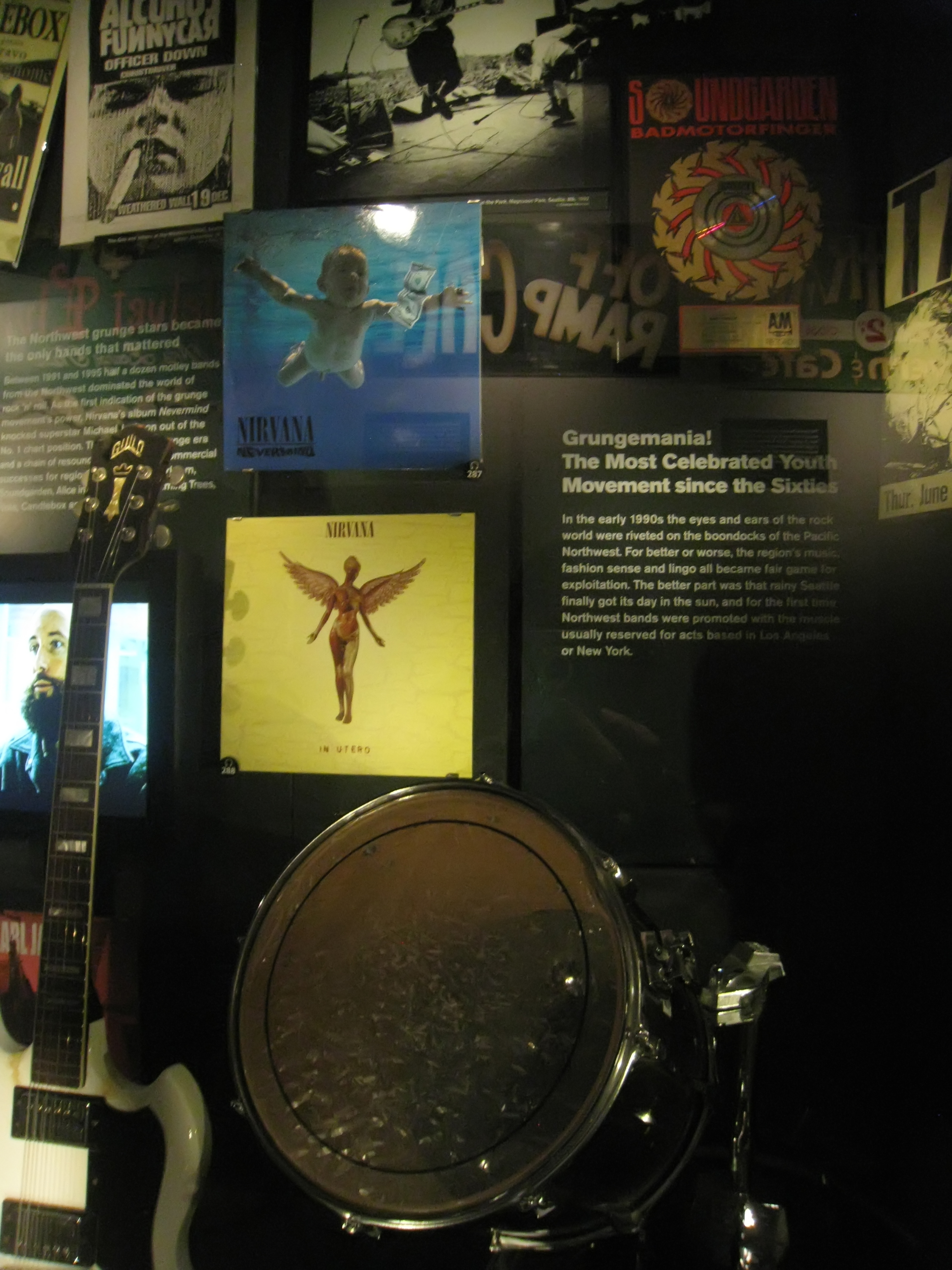 Seattle Music Scene Exhibit 3, EMP Museum